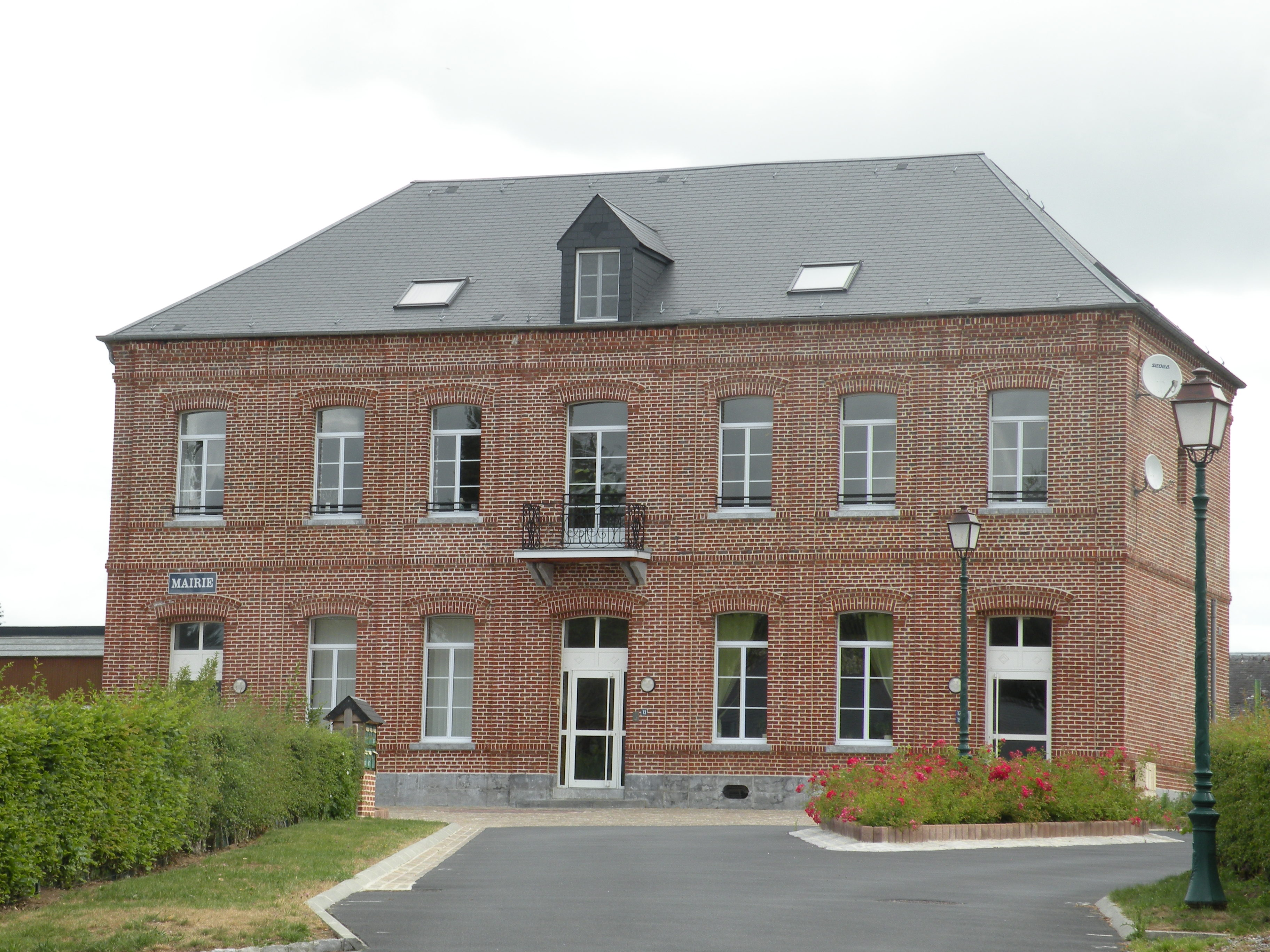 mairie de Boulogne-sur-Helpe